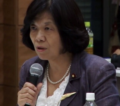 2012年、衆議院議員会館にて首都圏反原発連合と国会議員団との会合に参加する阿部知子。